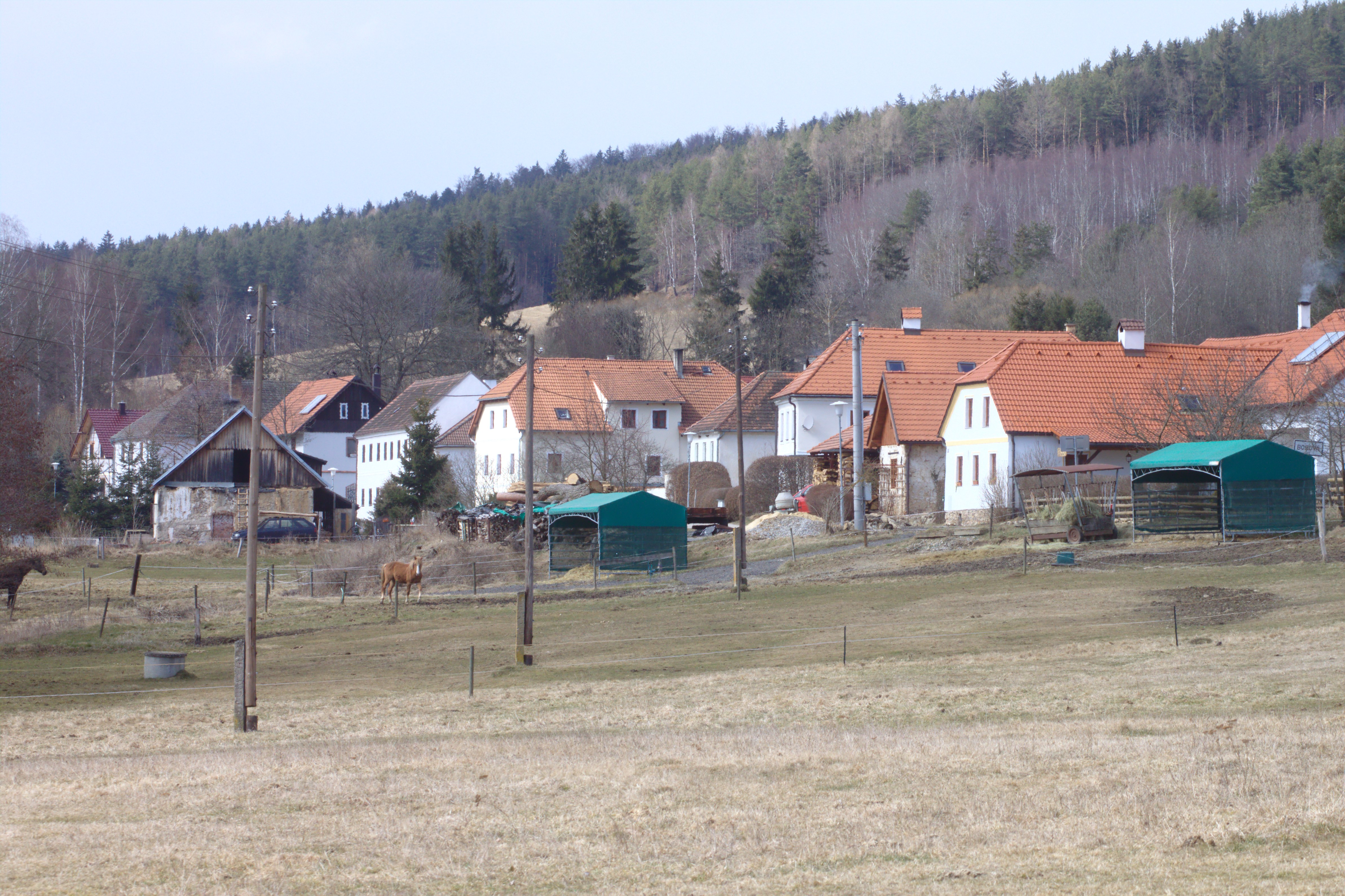 Domy ve vesnici Borová Project: Fotíme Česko